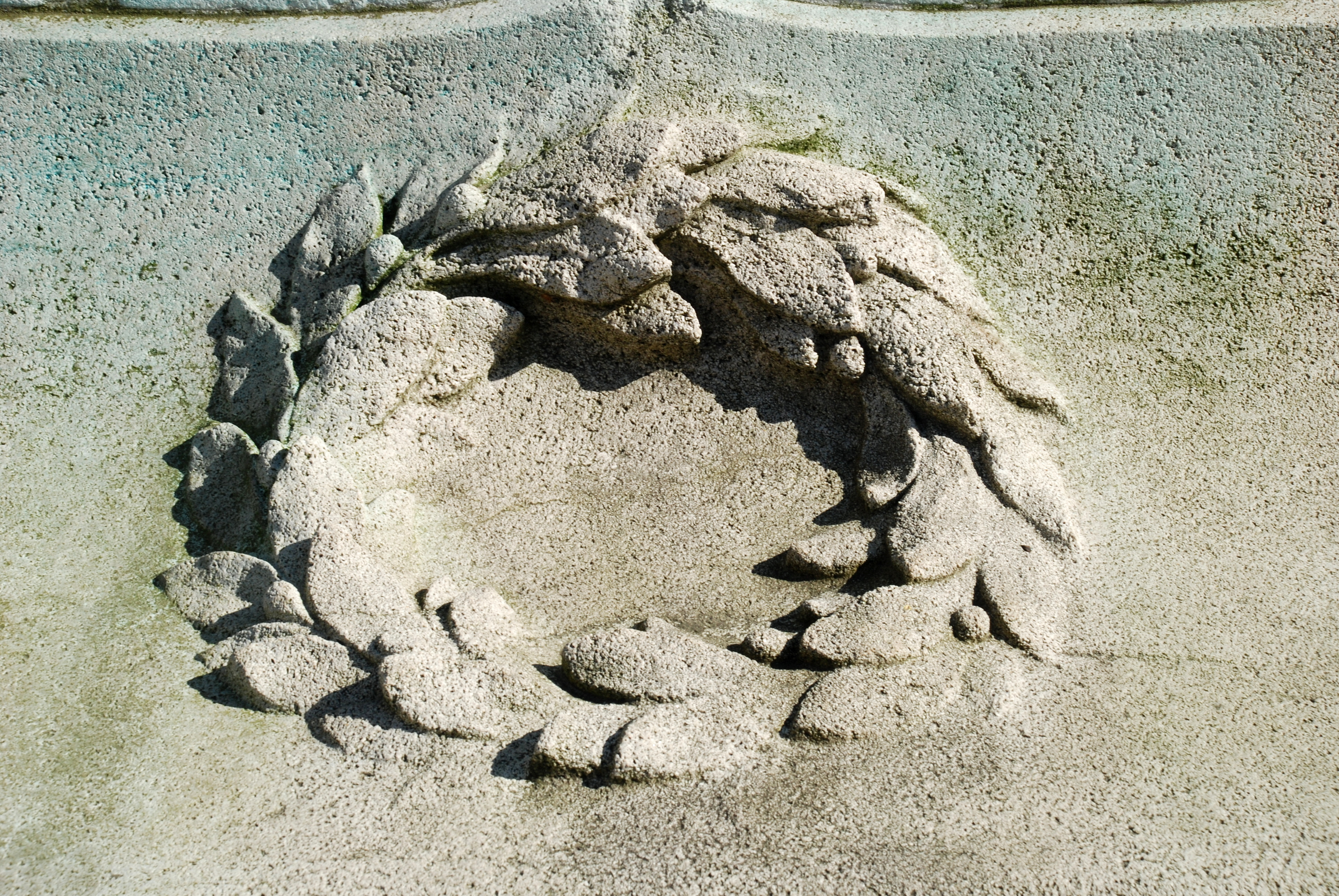 Belgique - Brabant wallon - Monument aux Morts de Court-Saint-Étienne